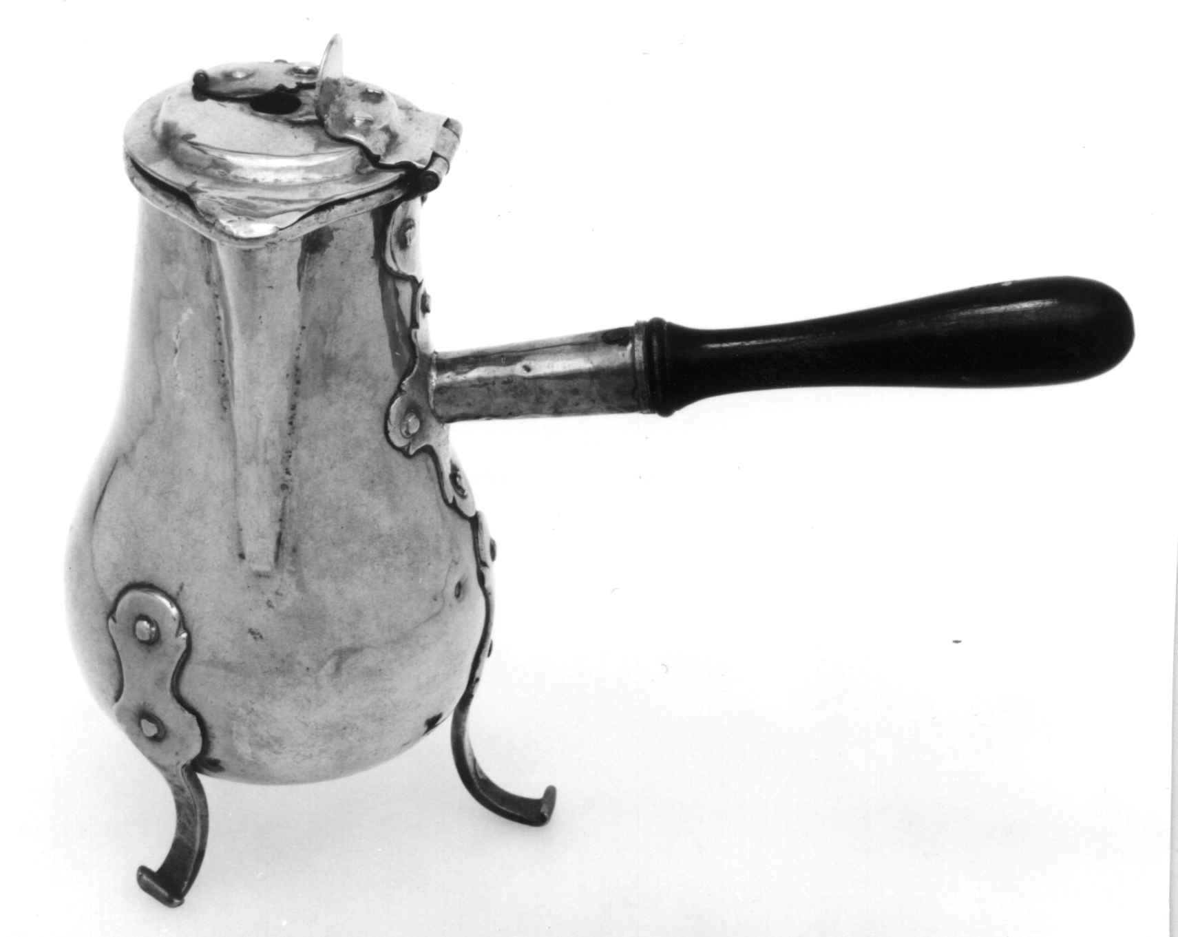 Sjokoladekanne fra 1700-tallet fra Mandal i Vest-Agder. Kannen er laget av kobber, og den har en åpning for rørepinne i lokket. Høyde 28 cm. Foto Norsk Folkemuseum, NF.1900-0110.